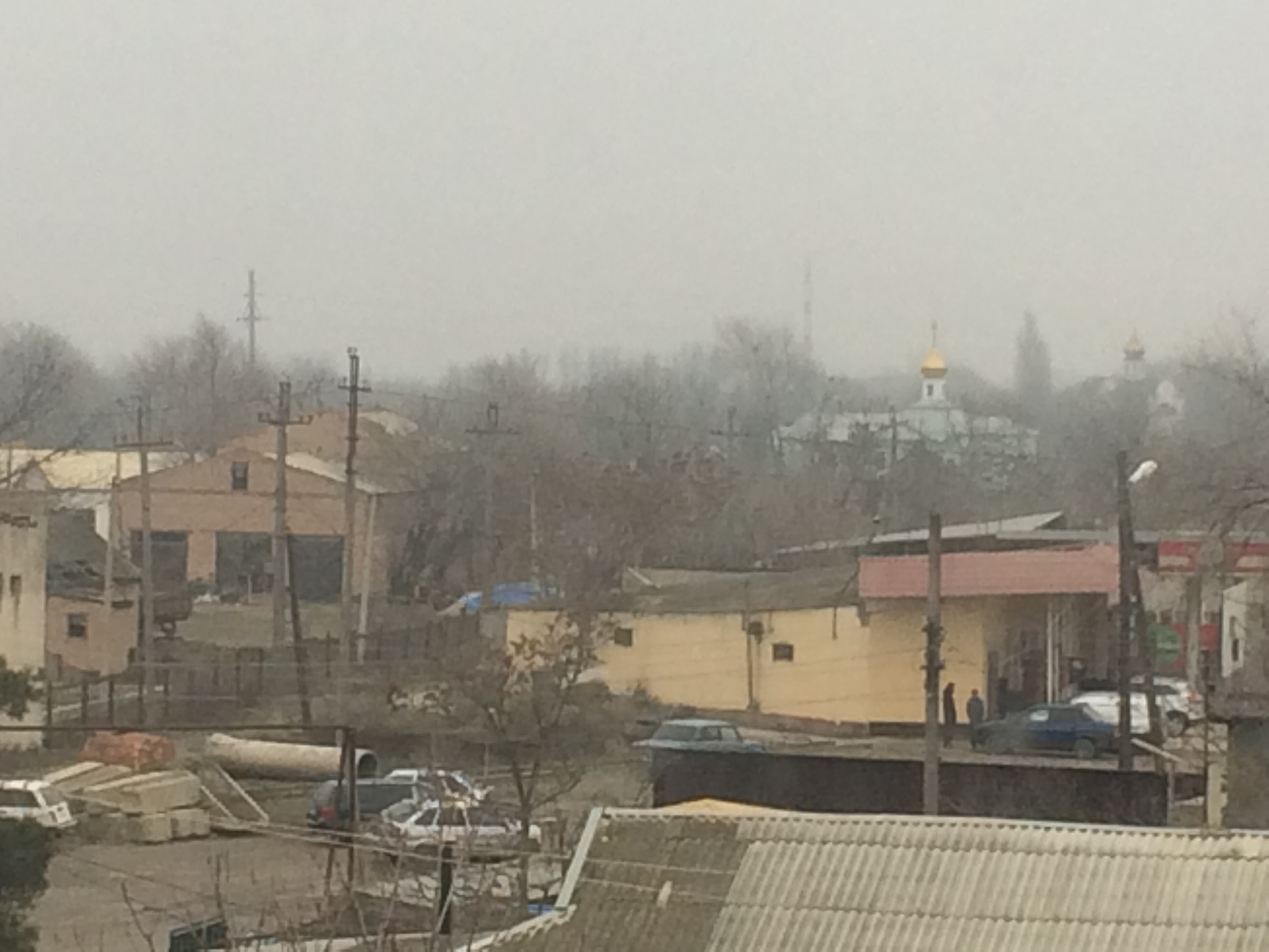 Крестовоздвиженский женский монастырь. Вид из окна кизлярской районной больницы.